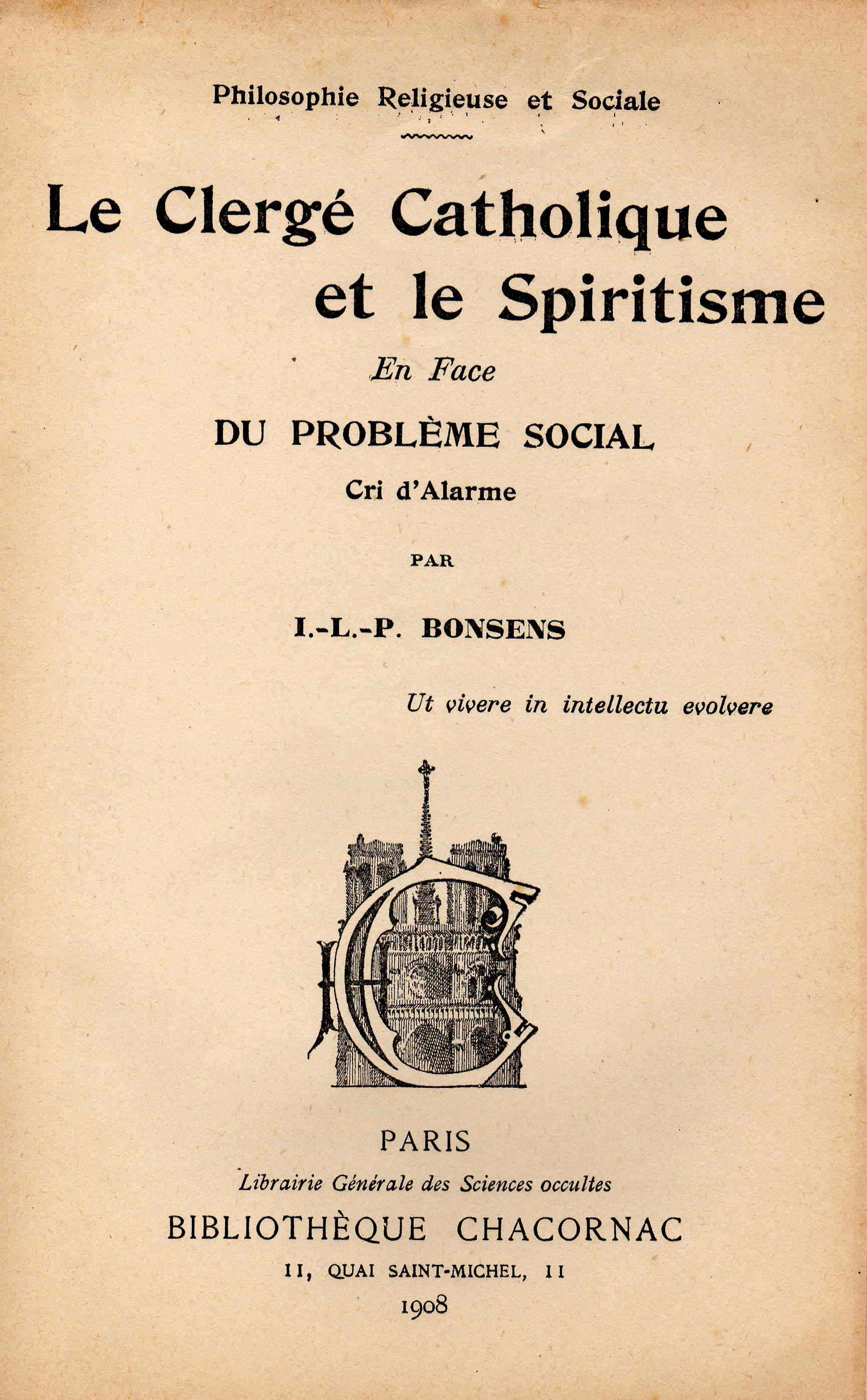 Couverture d'un livre tombé dans le domaine public.